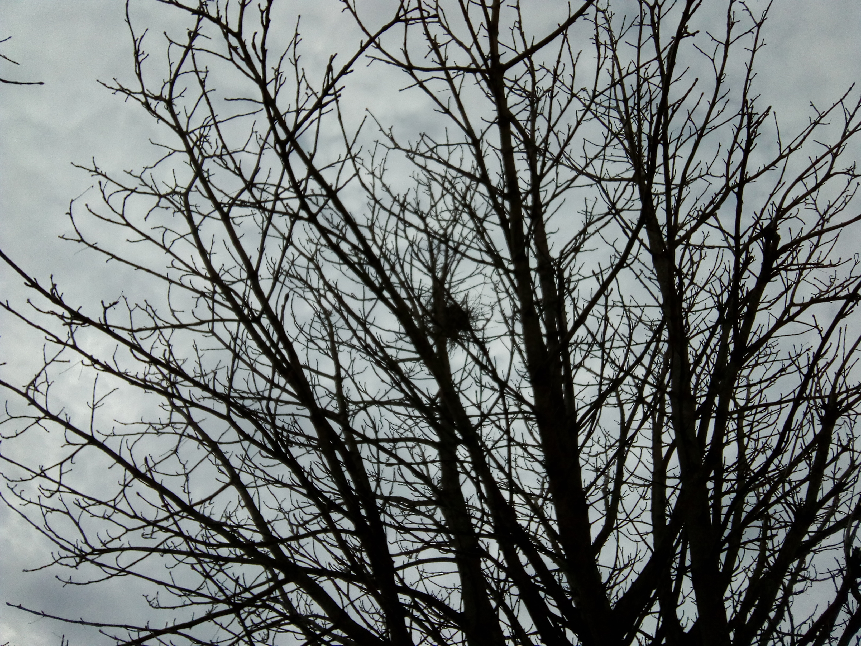 Niño nunha árbore. Nótase a dificil visualización aínda estando a árbore sen follas.